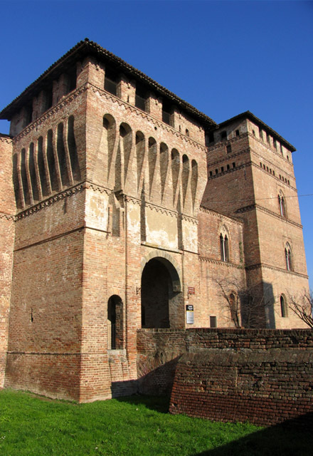 Castello Vesconteo - Pandino 01/2007